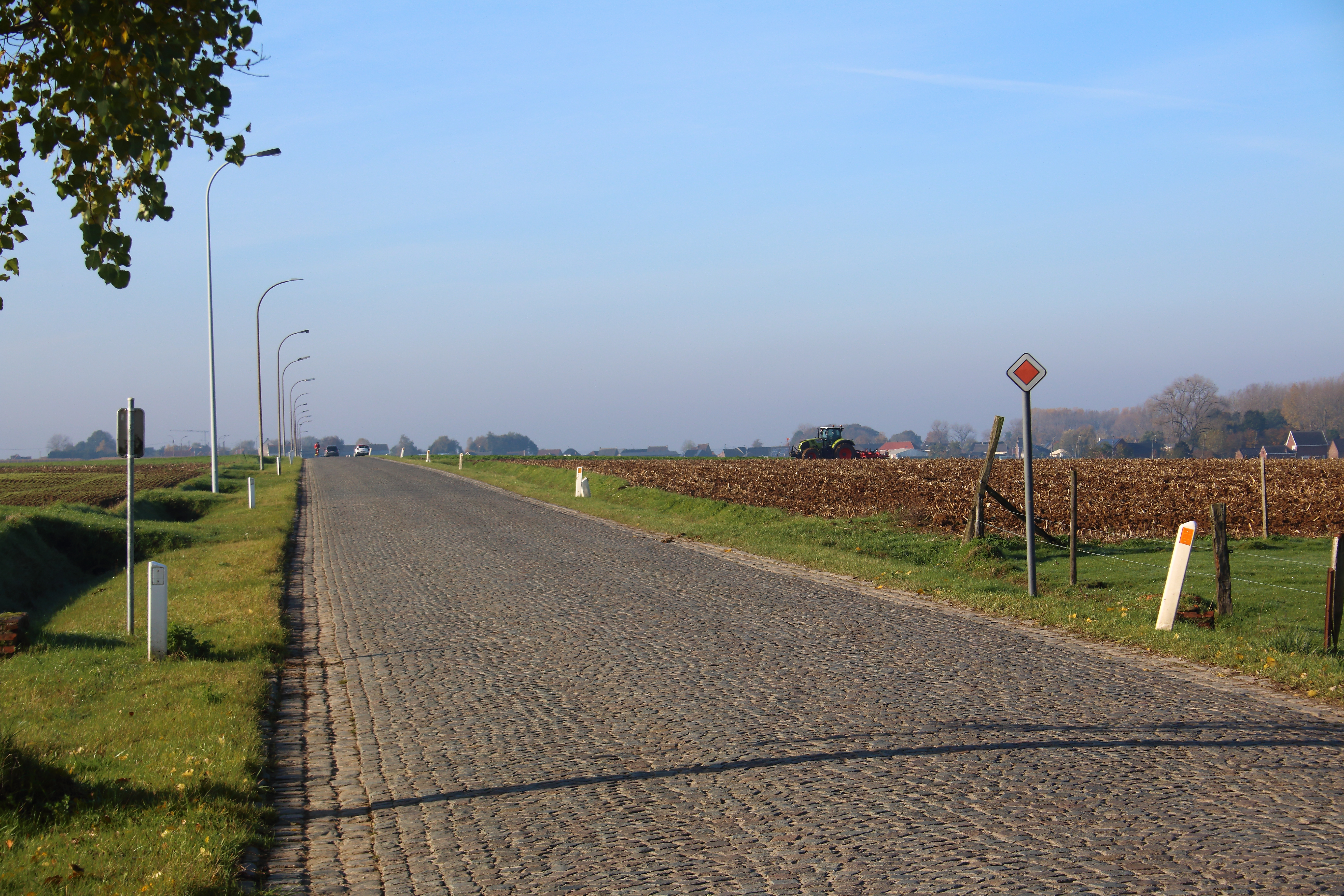 Lange Munte, Scheldewindeke, Oosterzele, Vlaanderen, België